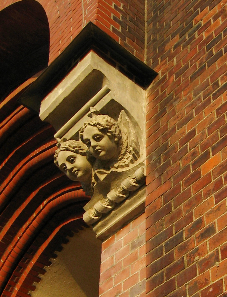 Bazylika NMP Anielskiej w Dąbrowie Górniczej